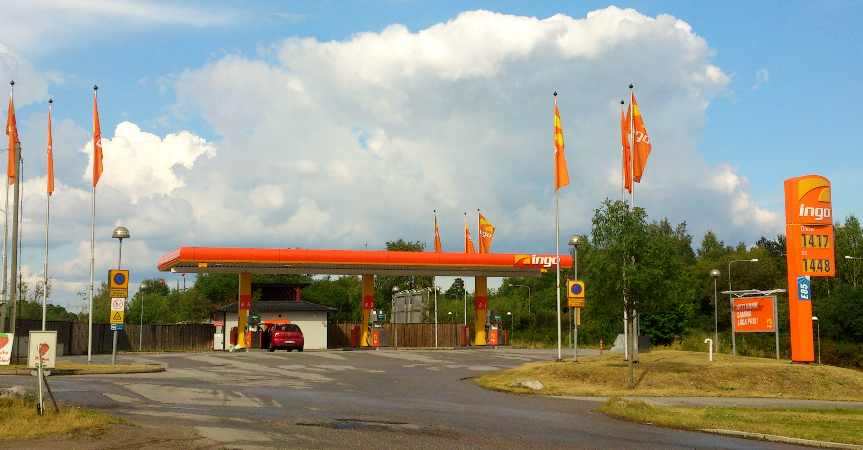 INGO-station i Vinsta, Stockholm